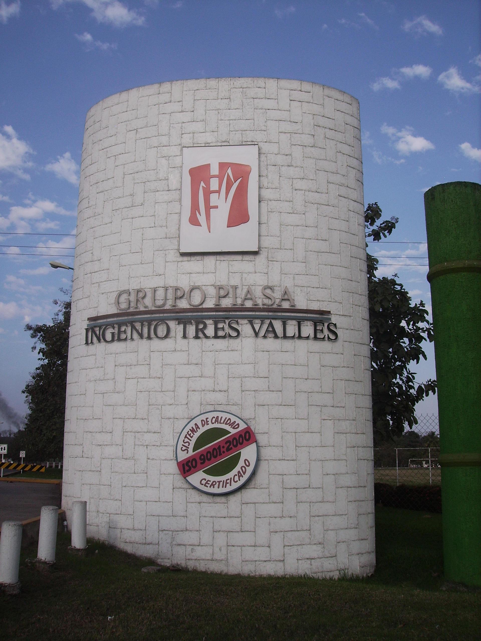 Entrada del ingenio Tres Valles, una columna en forma de caña de azúcar a un costado, y la pluma de la entrada se alcanza a ver a la derecha